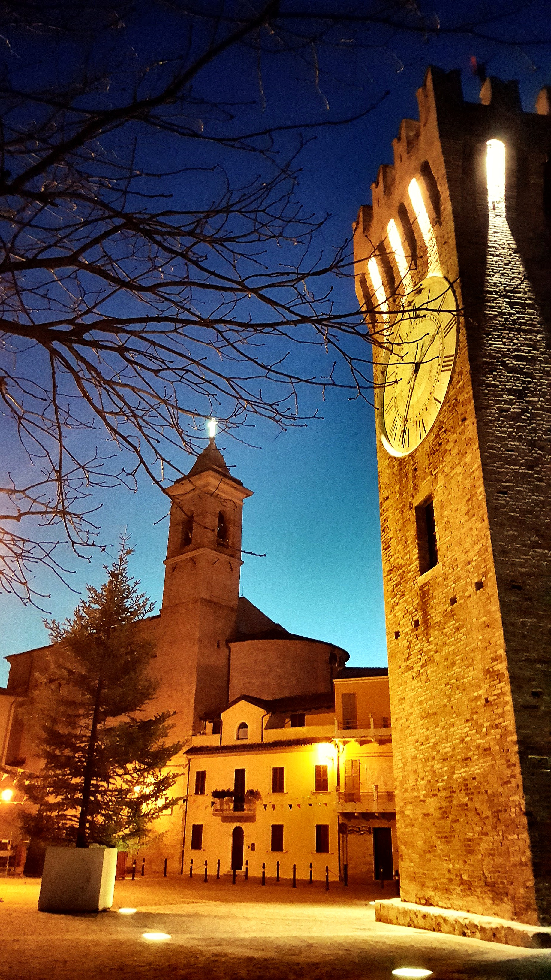 La piazza Giuseppe Sacconi è situata nel vecchio incasato (paese alto) di San Benedetto del Tronto, dalla piazza si possono ammirare la Torre dei Gualtieri, la Chiesa San Benedetto martire e un affaccio che domina tutta la città.